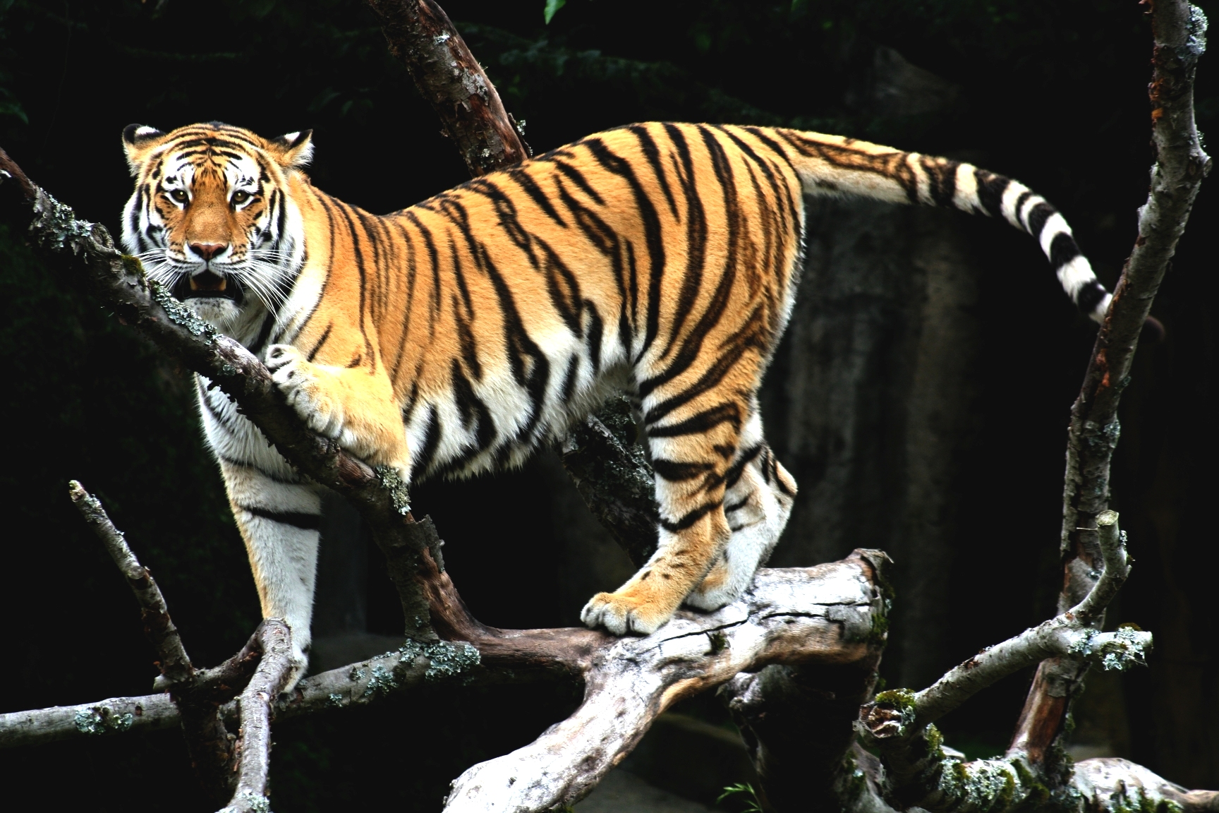 Tiger